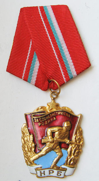 орден „Червено Знаме“ учреден на 13 декември 1950 от Президиума на I ОНС